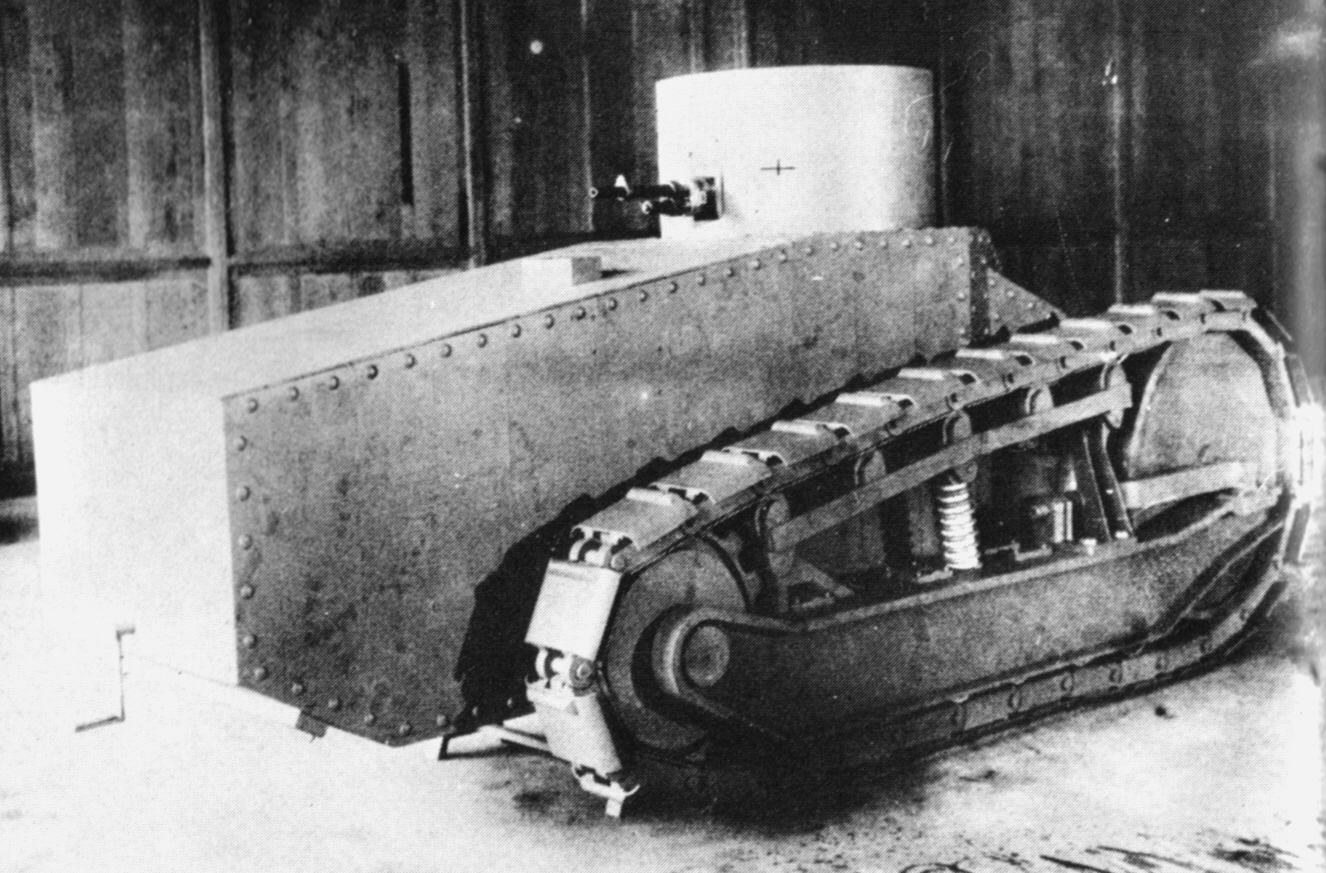 Digitale reproductie foto van de eerste maquette van de FT-17 tank